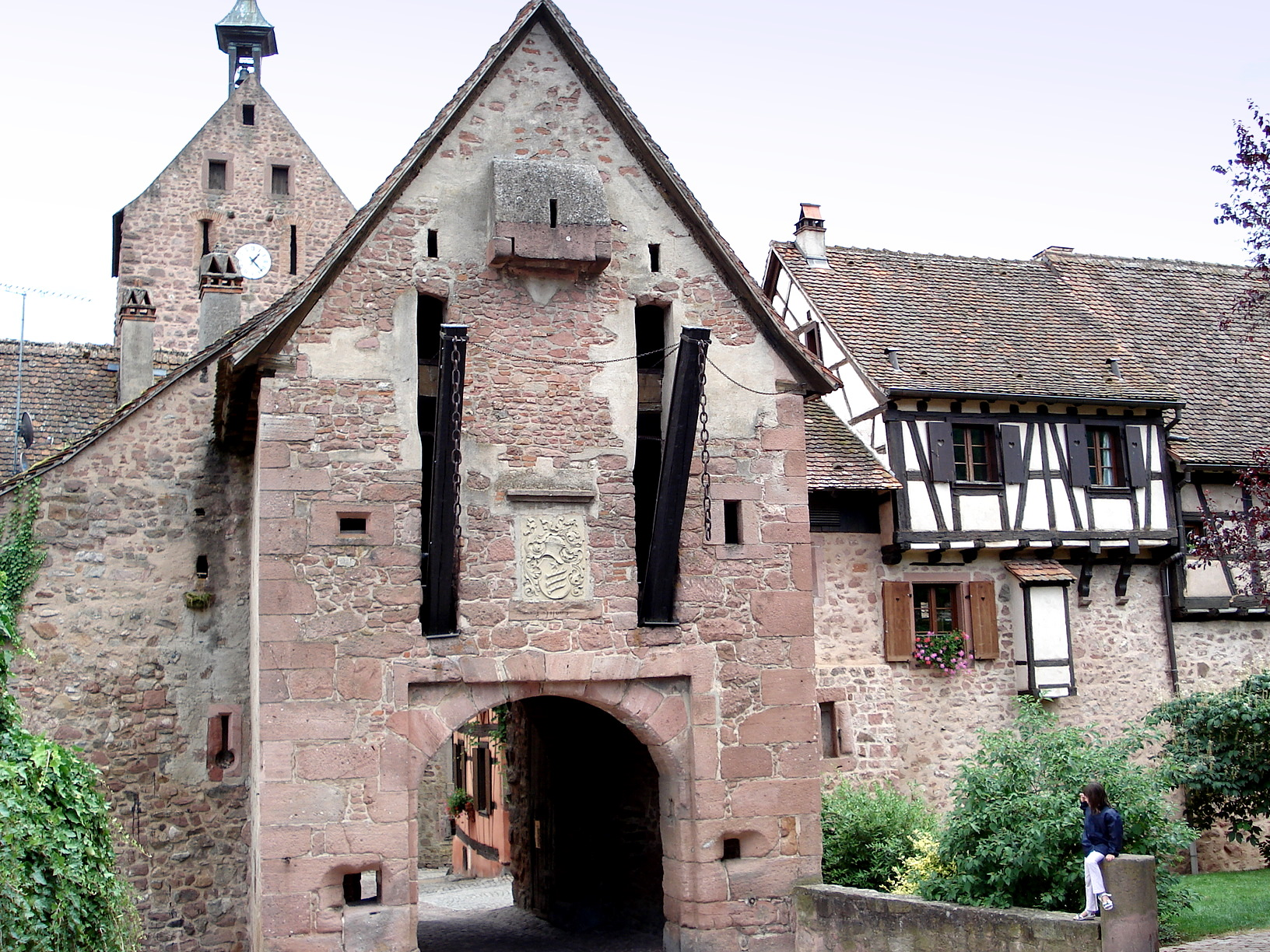 Riquewihr (dép. du Haut-Rhin, Alsace, France). Porte Haute (allem. Obertor), début XVIe siècle, anciennement doté d'un pont-levis, dont on aperçoit sur la photo les bras et les chaînes.